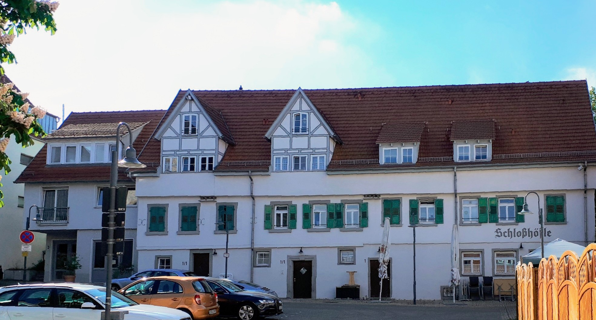 Ehemaliger Meierhof an der Nordseite des Schlosshofes in Remseck-Aldingen